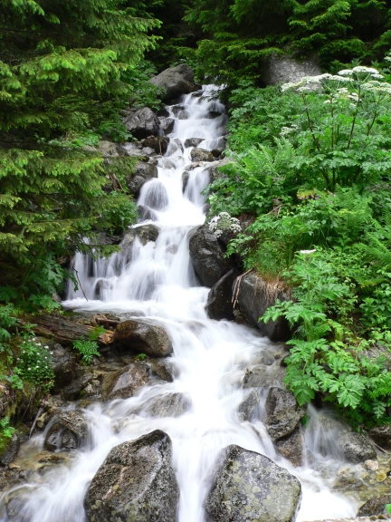 Юлен